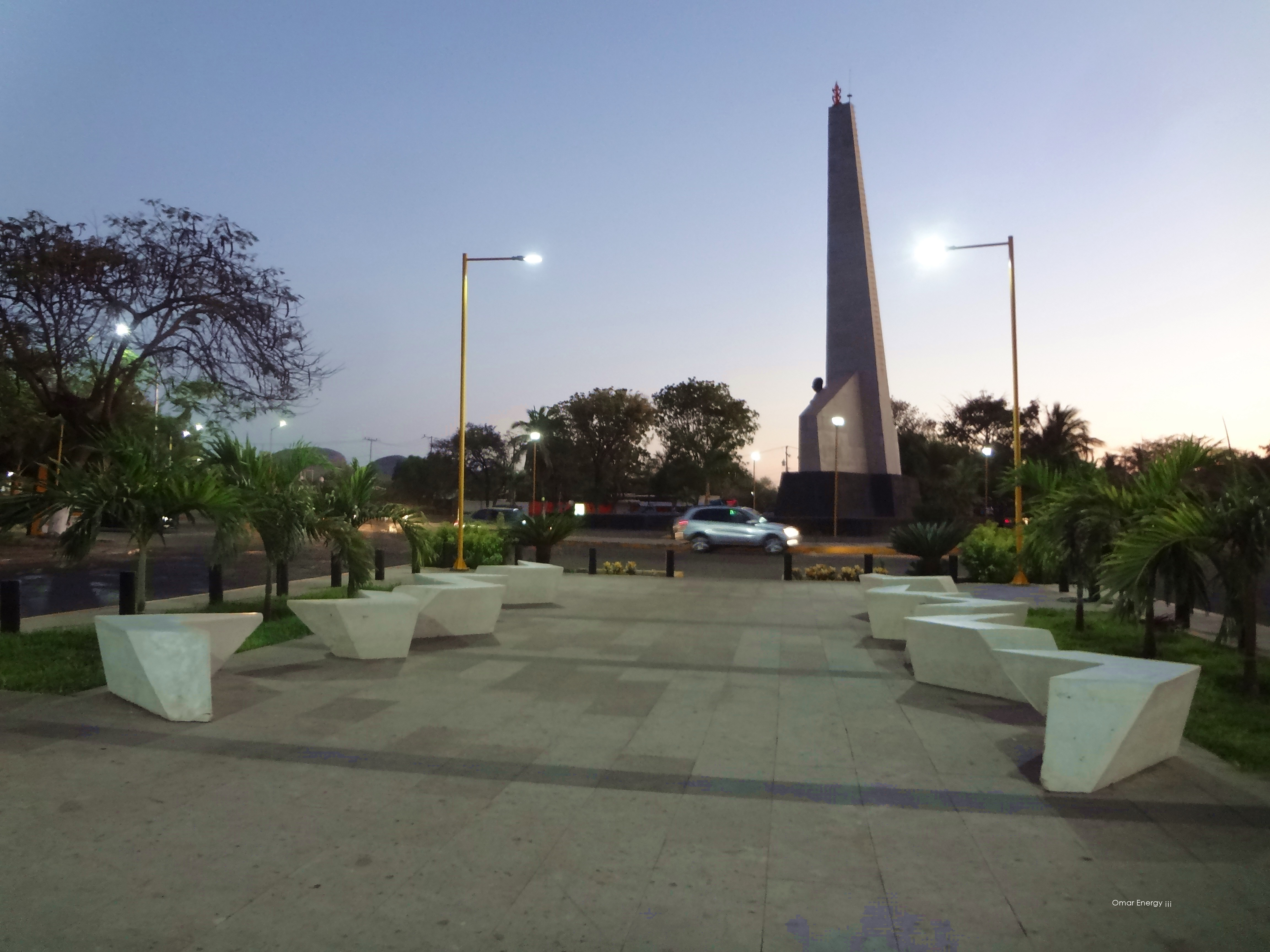 Apatzingan. Búscame en Facebook y en Youtube como; Omar Energy ¡¡¡ .